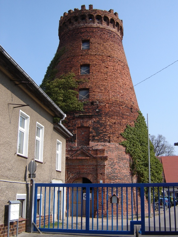 Genthin-Altenplathow, Mühlturm